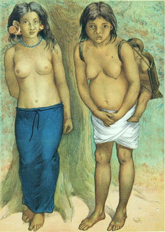 Litho. Carl Bock maakte in 1879 en 1880 een reis in Oost- en Zuid-Borneo, van Koetei naar Banjermasin. Over zijn ervaringen heeft hij een boek gemaakt.. Kleurenlitho getiteld "Poenansche moeder en jong meisje"